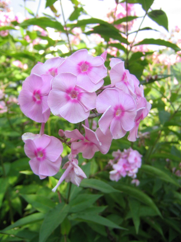 Phlox Blüte